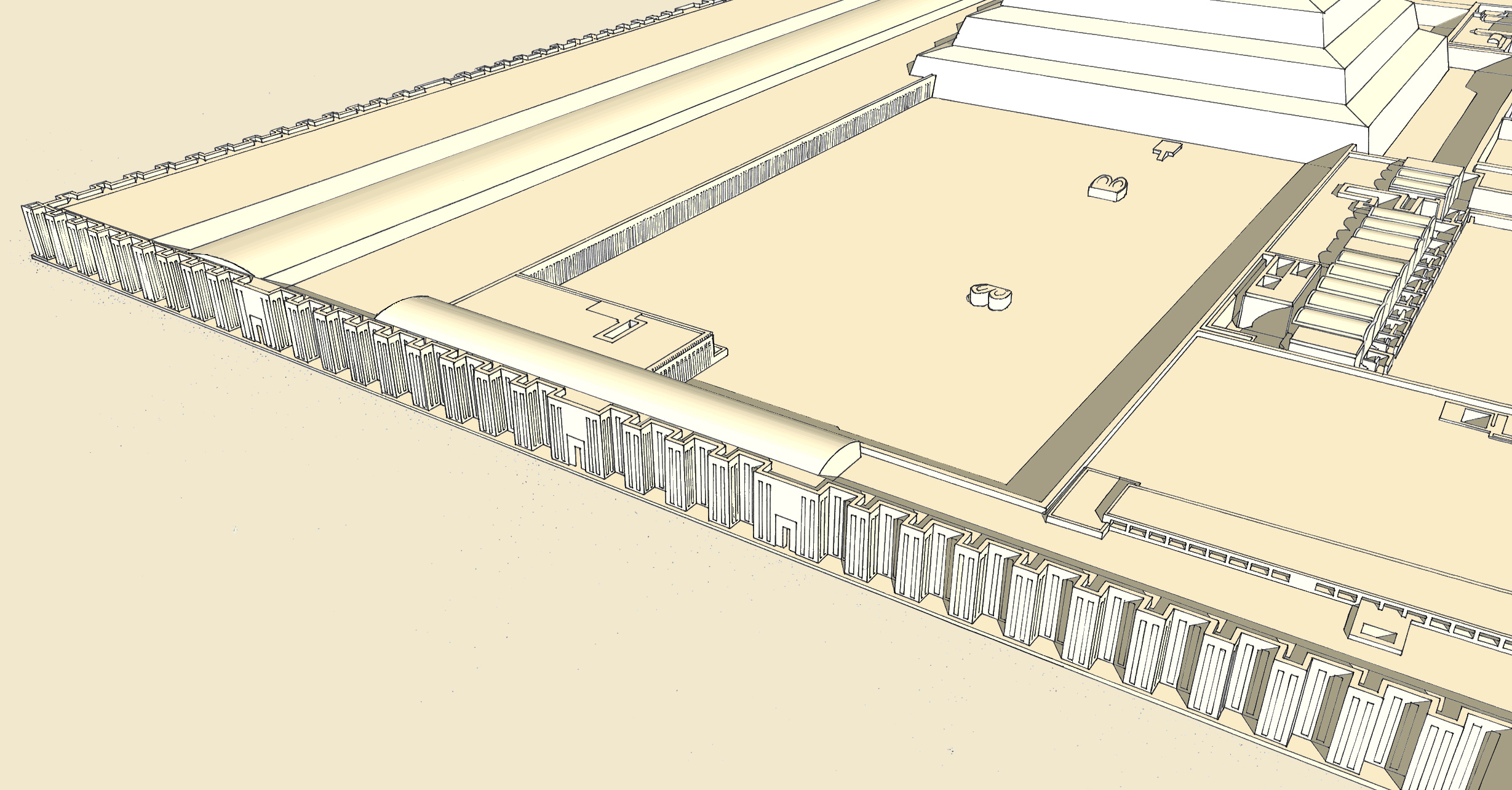 Position de la tombe sud dans le complexe de Djoser